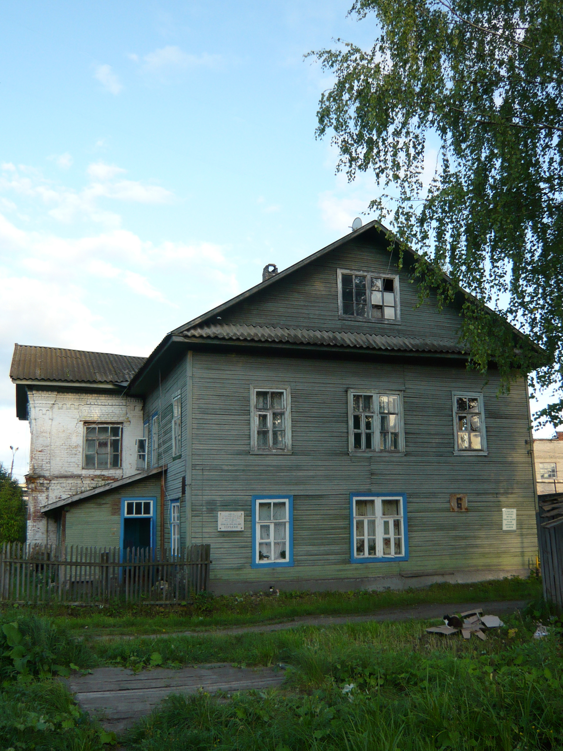 Фотография дома в городе Кувшиново, в котором родился известный русский лексикограф, составитель знаменитого словаря русского языка Сергей Иванович Ожегов